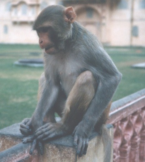 persona foto